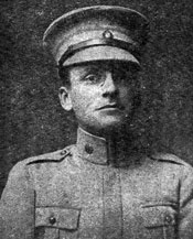 José Ferreira de Lacerda, cónego, jornalista e benemérito da cidade de Leiria (1881-1971)